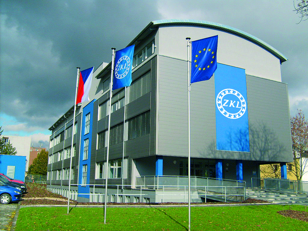 Současná fotografie ředitelství koncernu ZKL v Brně